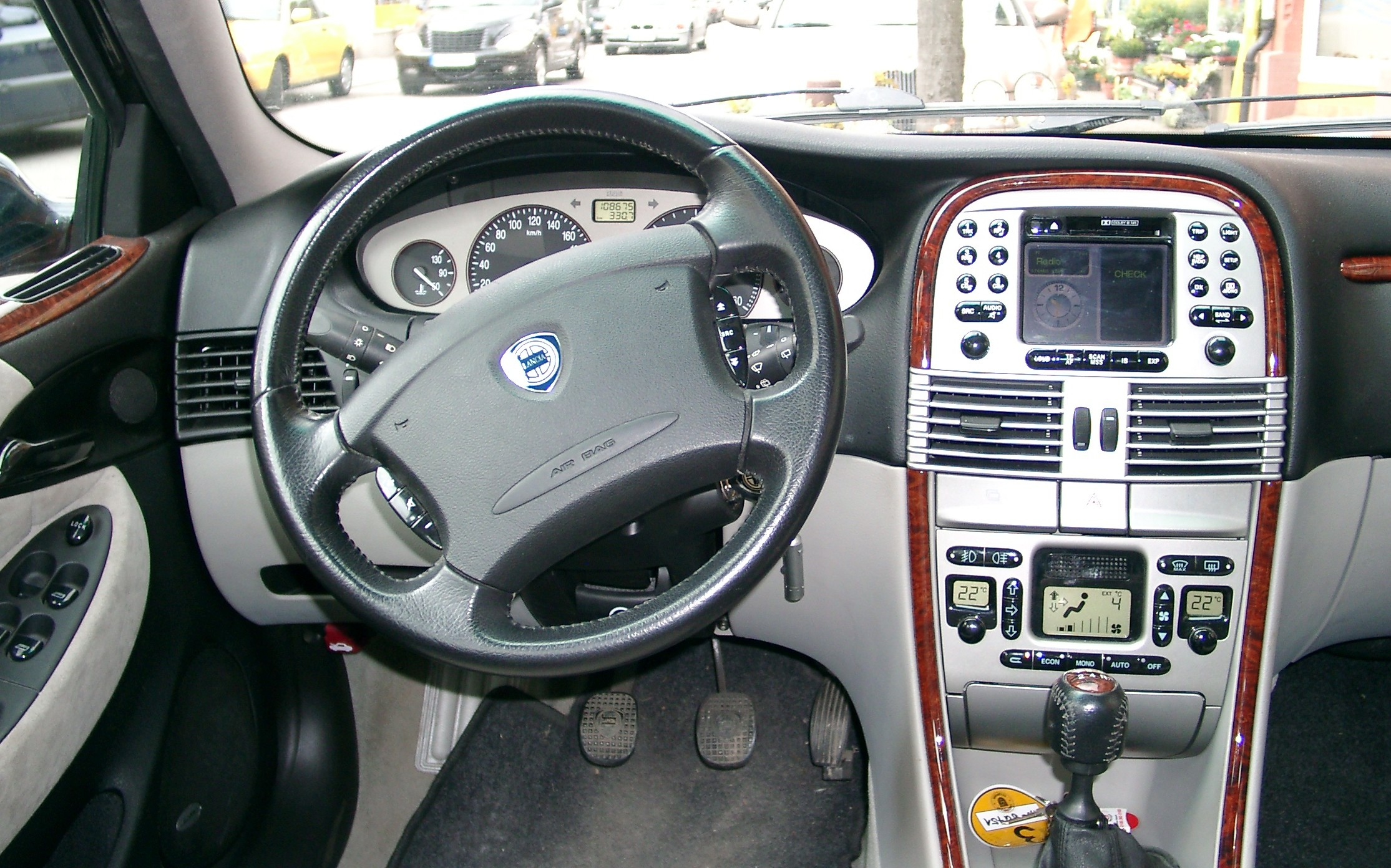 Lancia Lybra SW Armaturen